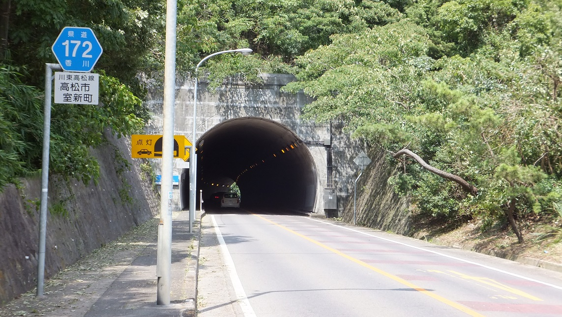 香川県高松市室新町の香川県道172号 栗林トンネル（起点側より）